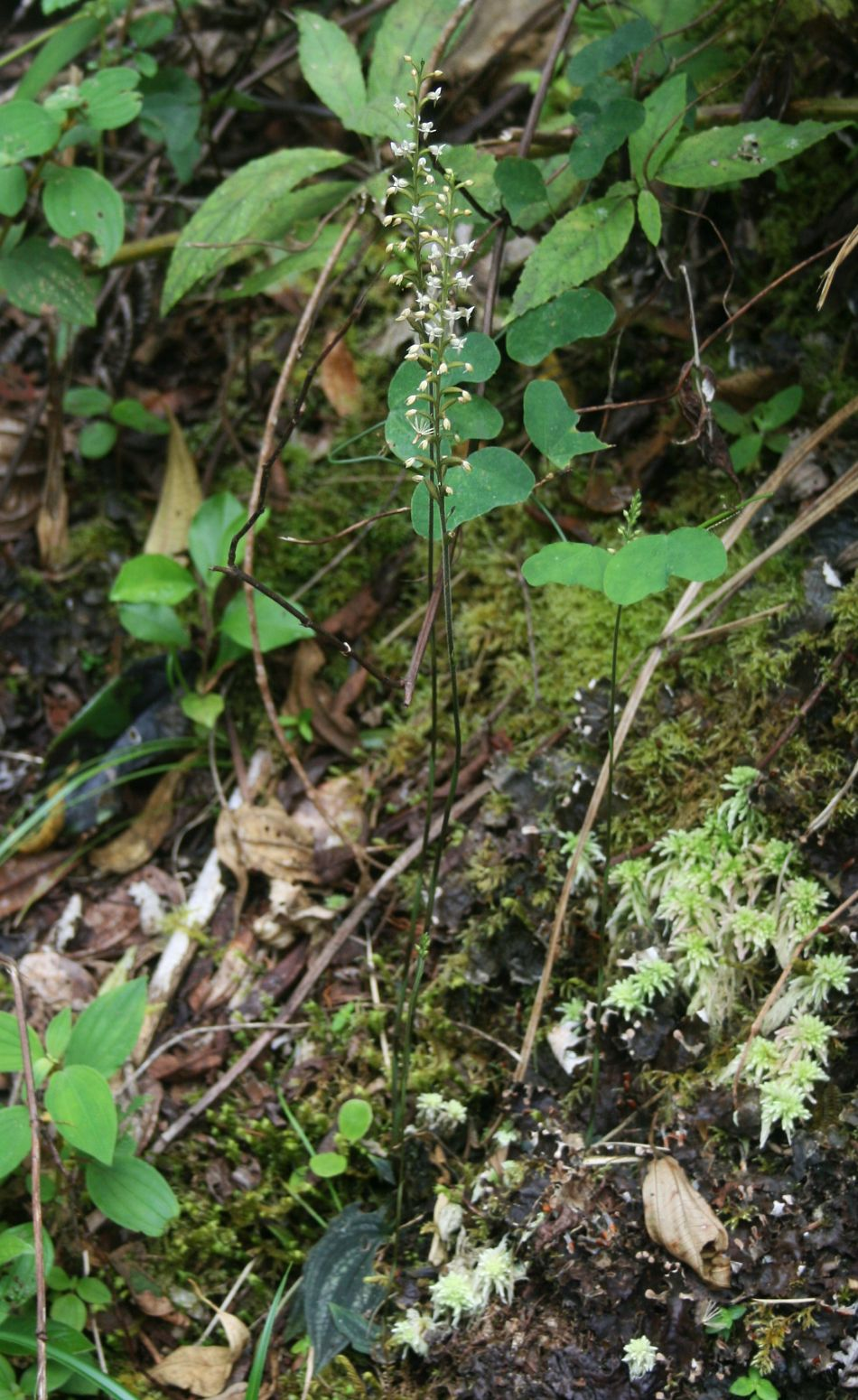 Cranichis diphylla, Orchideen (Orchidaceae) – Kolumbien/Colombia: Dpto. Magdalena, Sierra Nevada de Santa Marta, Reserva Natural de las Aves El Dorado, El Dorado EcoLodge: "Kogihabs", ca. 7 km SE Minca, ca. 2000 m